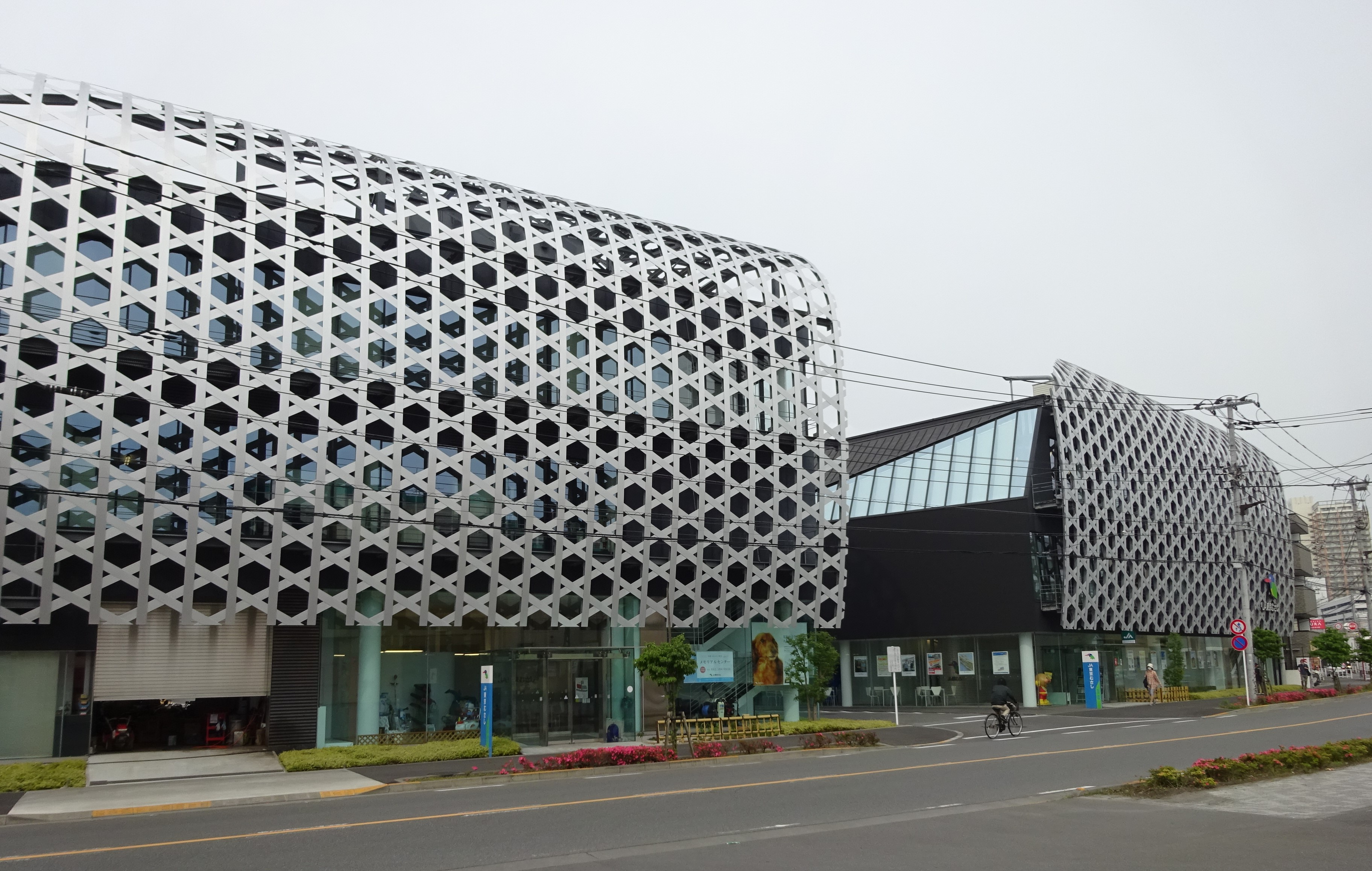 東京むさし農業協同組合 本店